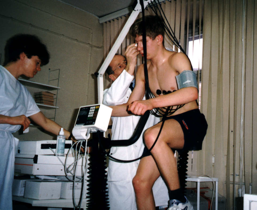 Fahrradergometrie mit Laktatbestimmung in der Praxis